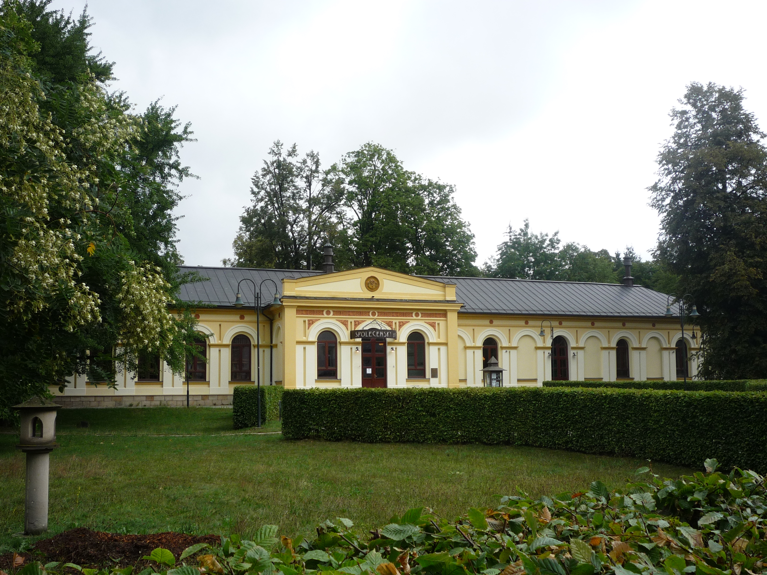 Autor fotografie Jiří Zelenka. Společenský dům.Neoficiální centrum společenských aktivit pro město a okolí nabízí k využití společenský sál, salónek, sportovní bar, letní zahrádku a stylovou restauraci. Jde o Rožnovský Rynek, který je interiérem inspirován rožnovským náměstím z 2. poloviny 18. století. Prostory jsou upraveny tedy tak, aby každý návštěvník viděl, jak se v dávných dobách stavělo a žilo. Rožnov pod Radhoštěm. Okres Vsetín. Zlínský kraj. Czech Republic.